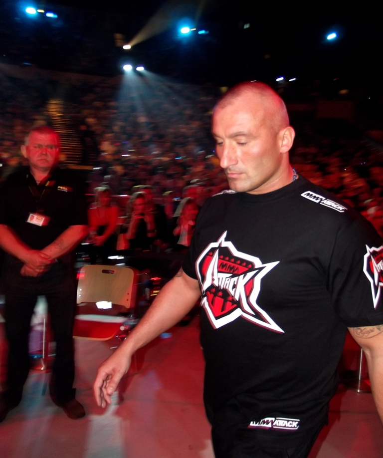 Zdjęcie zrobione podczas gali mieszanych sztuk walki MMA Attack 2 w katowickim Spodku.